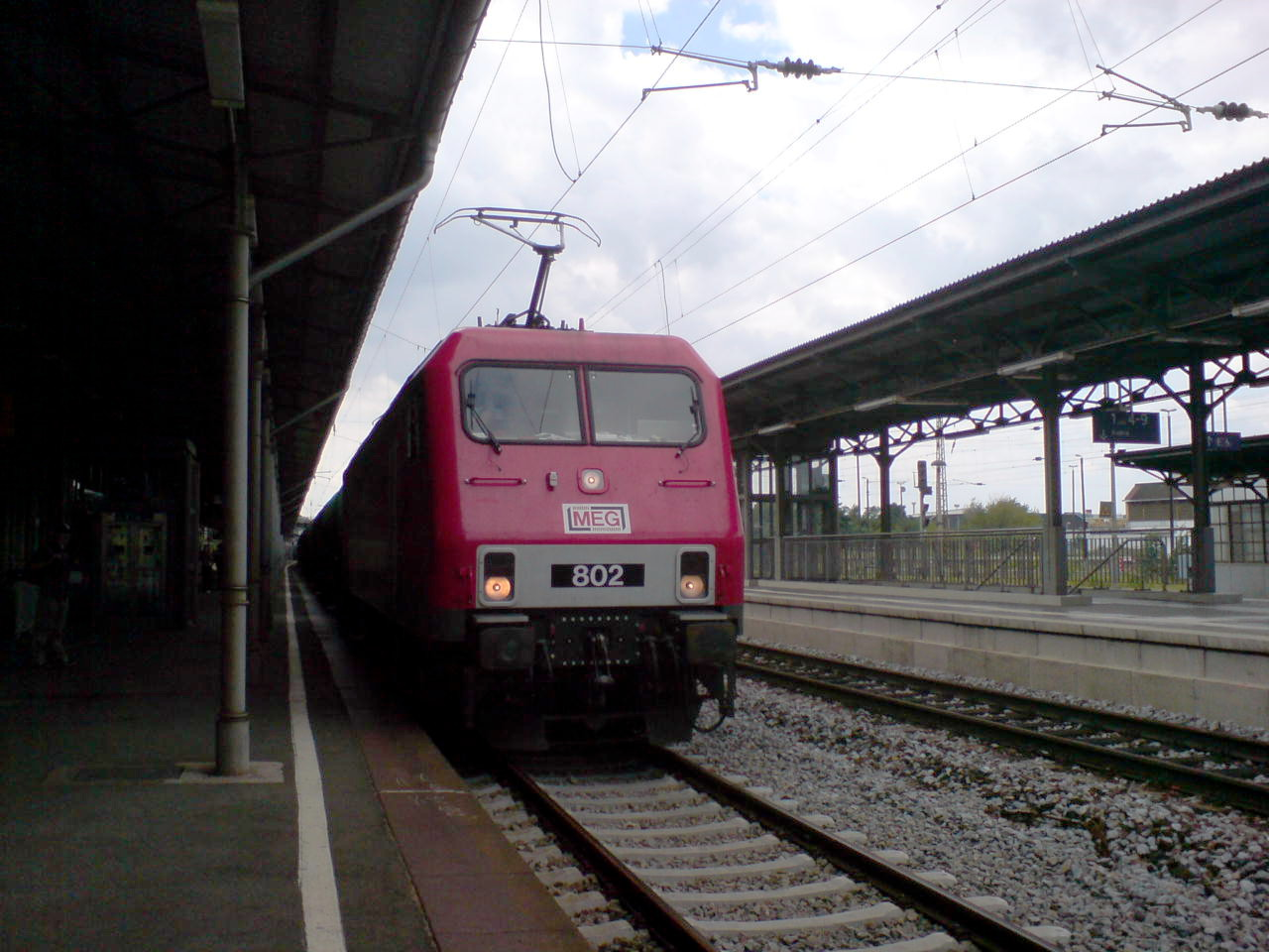 MEG 802 mit einem Kesselwagenzug in Riesa (25. Juli 2007)